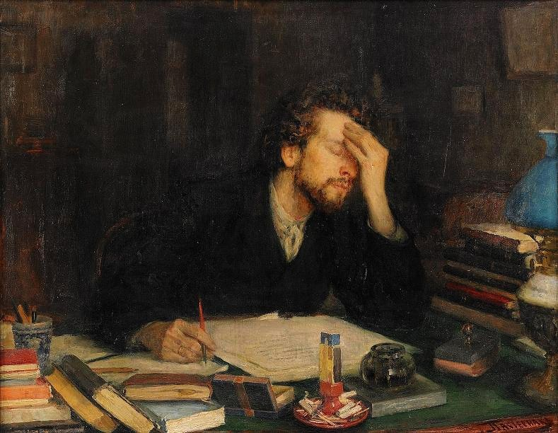 Image by Leonid Pasternak